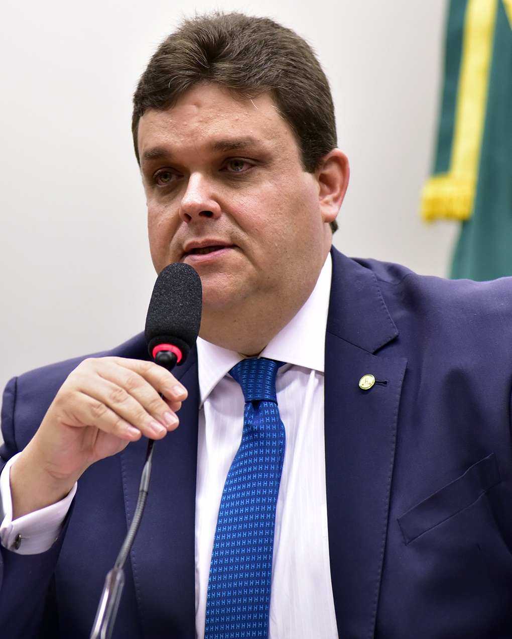 Wolney Queiroz em maio de 2016.